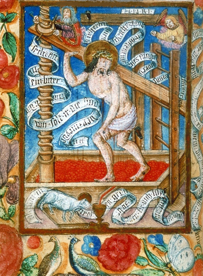 Christus in der Kelter; in: Gebetbuch des Ulrich von Montfort; Wien, Österreichische Nationalbibliothek, cod. 2748, fol. 49v.